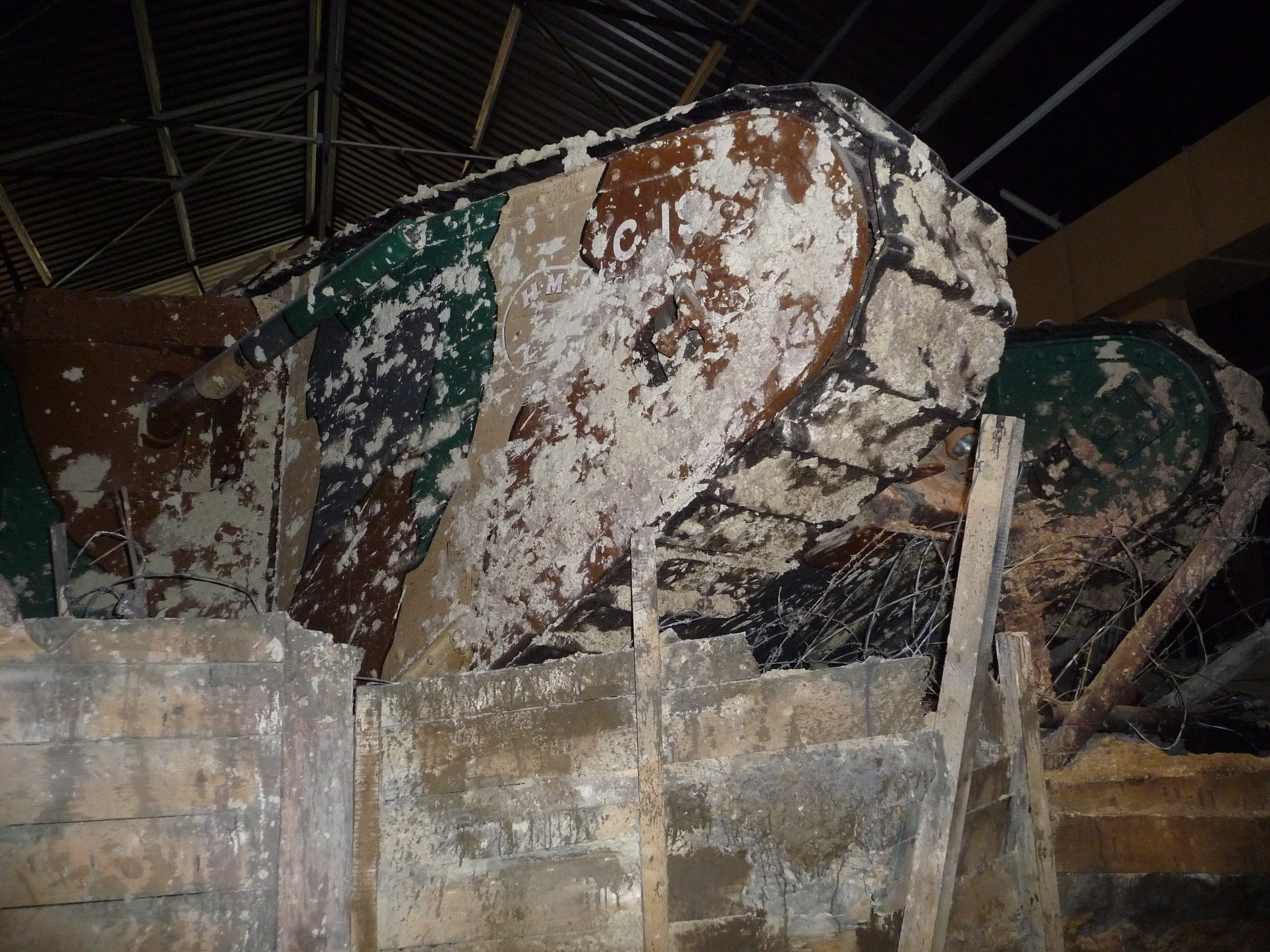 WW1 Mark (Male)